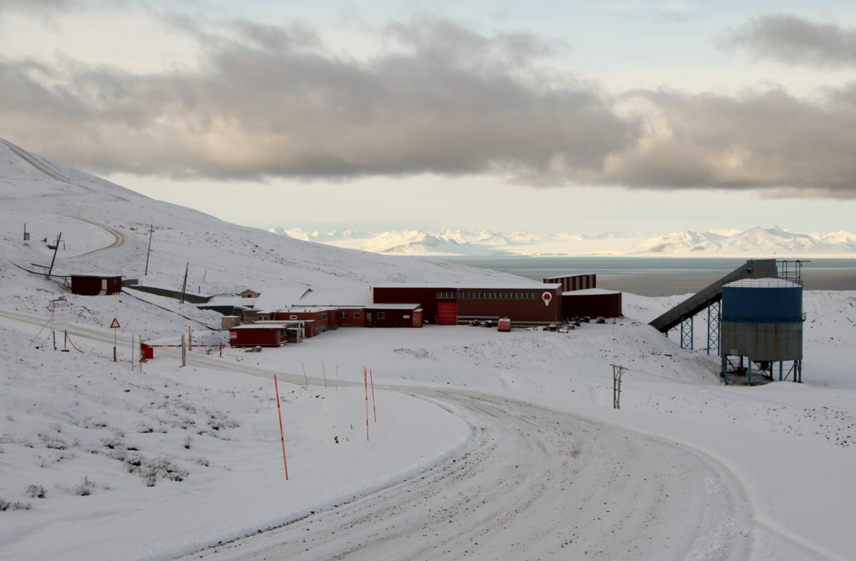 Old mine facilities in Plataaberget / Gruve 3, longyearbyen, Spitsbergen (Norway)